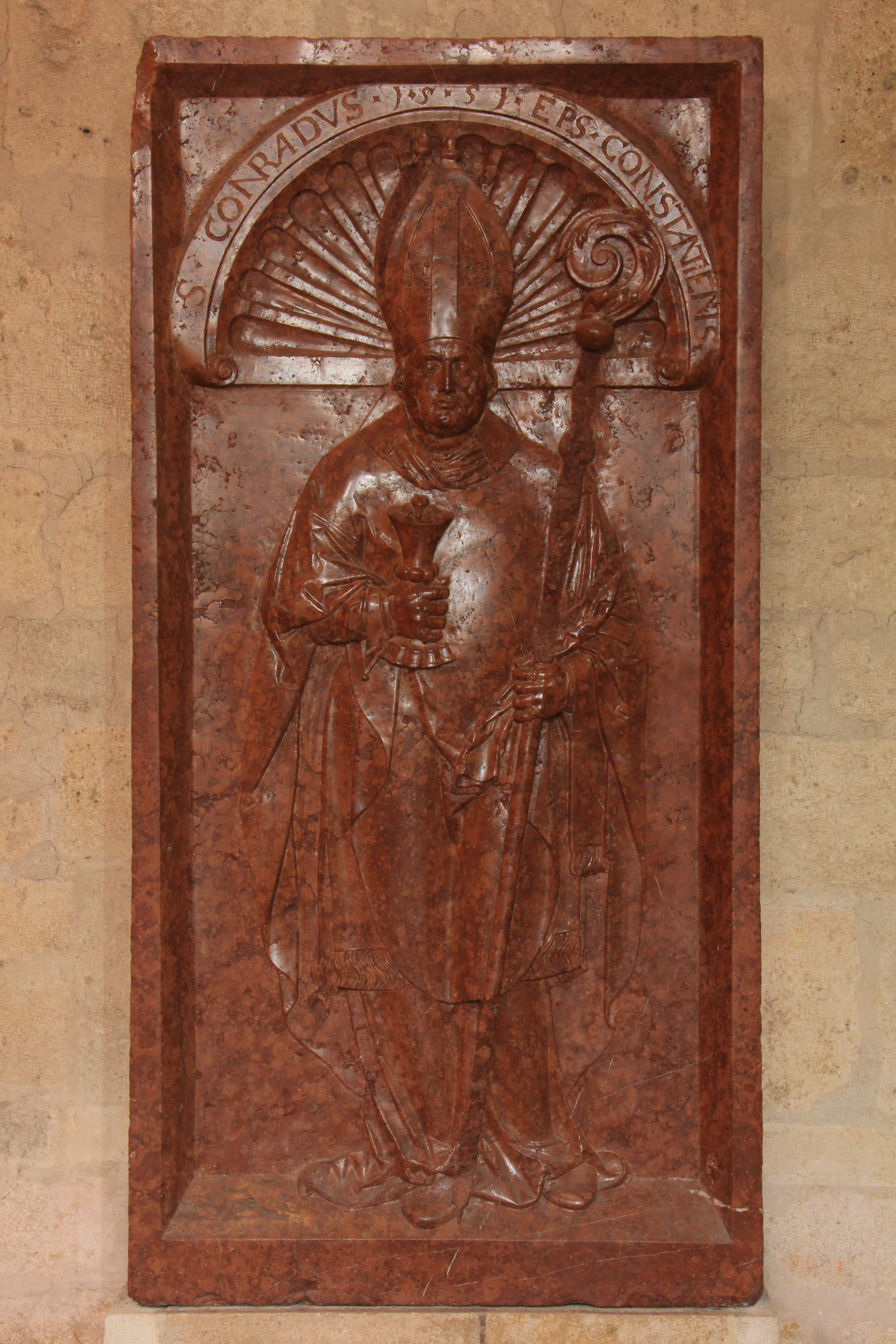 Vorderseite des Grabsteines für Abt Konrad Faber in der Stiftskirche in Heiligenkreuz